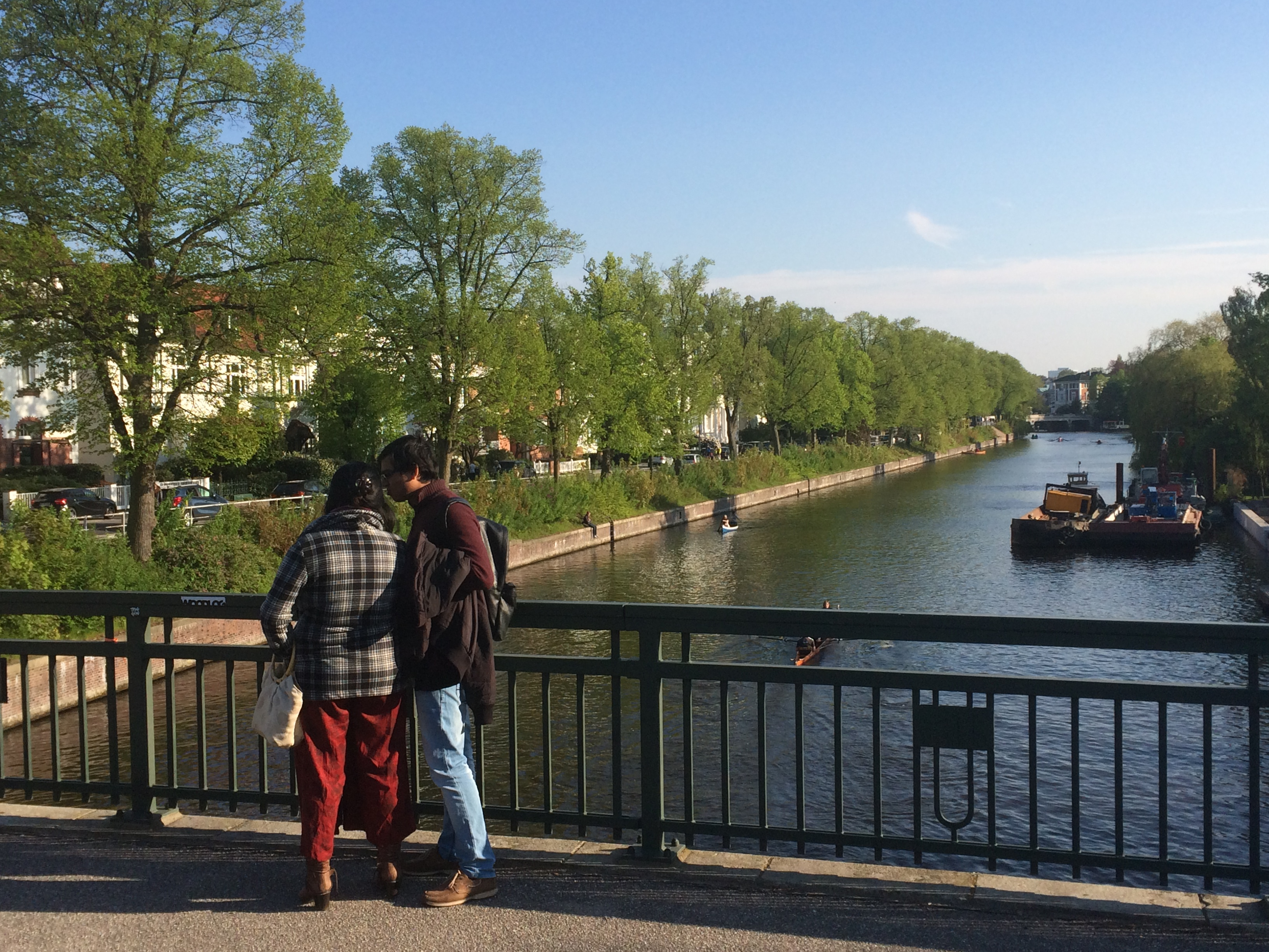 Alsterbrücke Klärchenstraße Hamburg-Winterhude/Eppendorf